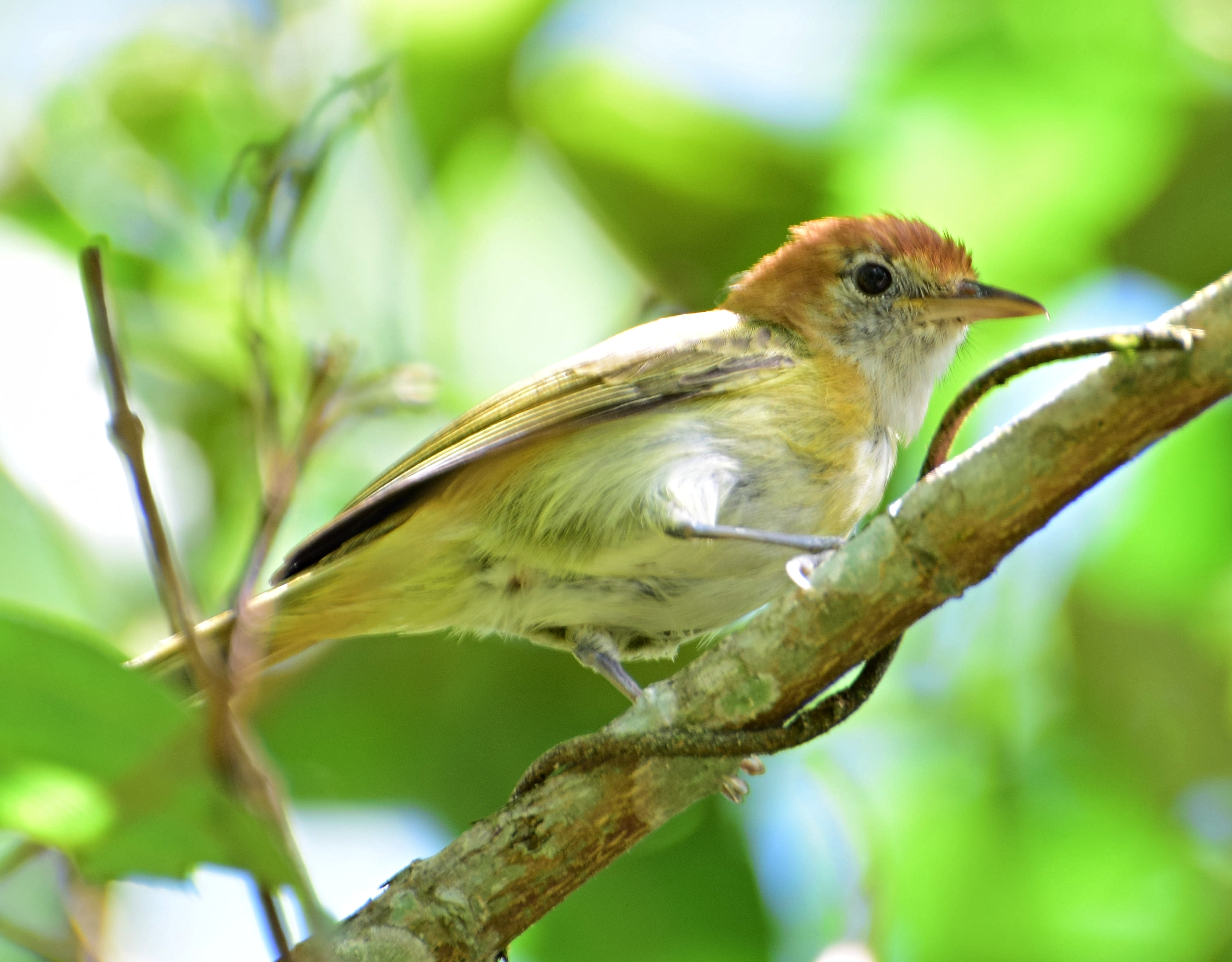 Hylophilus semibrunneus (Verderón castaño)